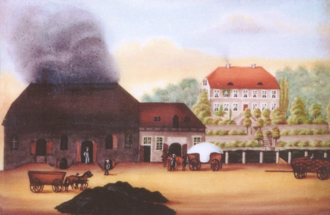 Glashütte Osterwald, Bild von etwa 1840